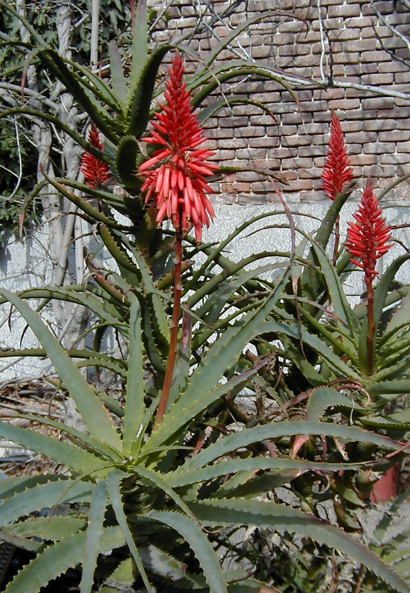 Aloe arborescens. Real Jardín Botánico de Madrid.